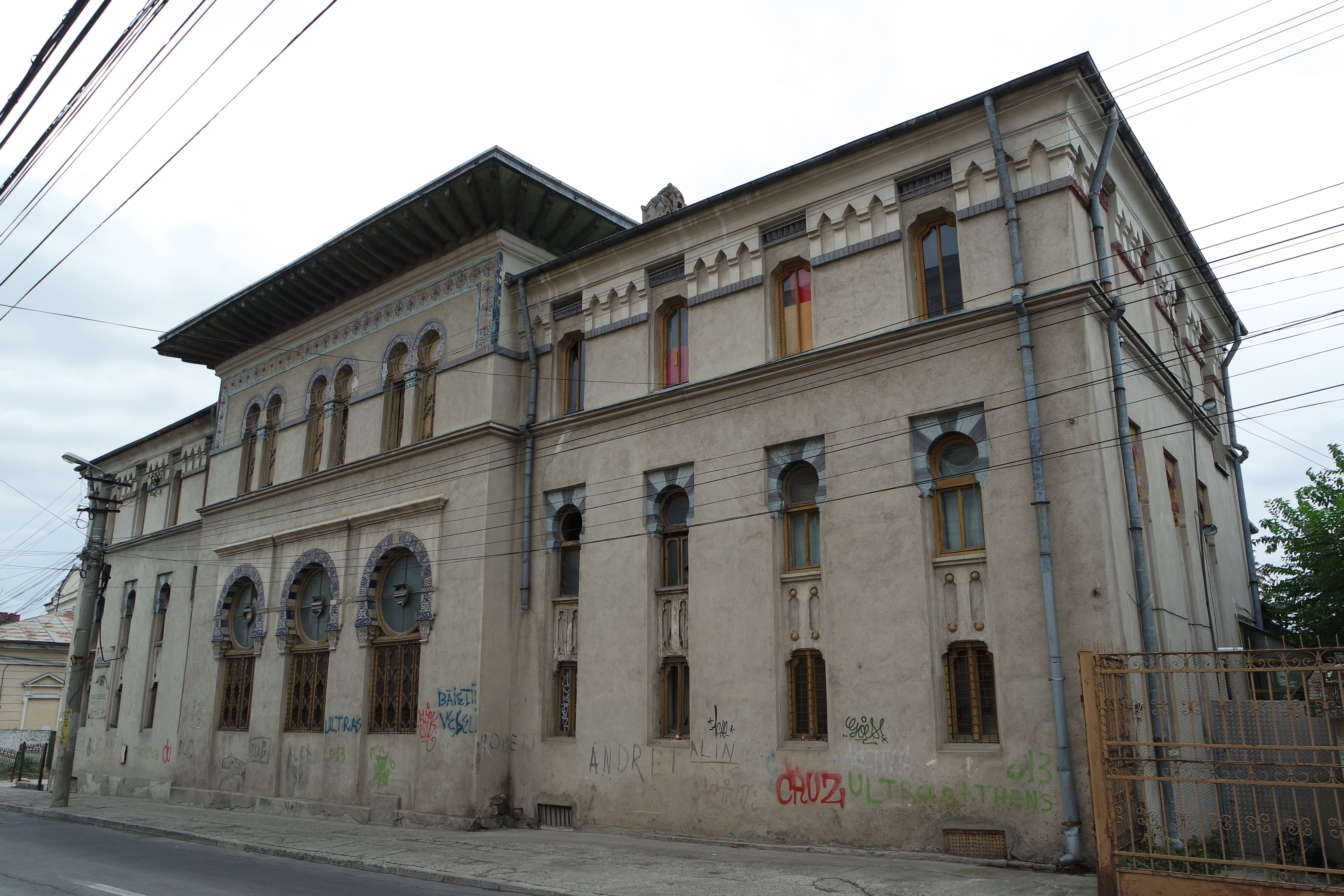 Baia Turceasca (Comunala) Iasi, Str.Arhitect G.M. Cantacuzino (fosta Crisan)